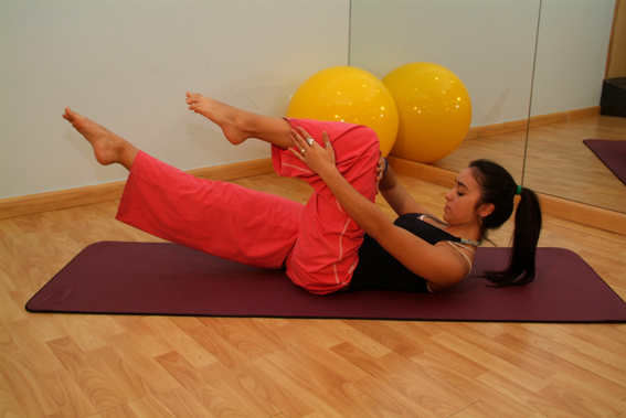 Curso de Instructor de Pilates